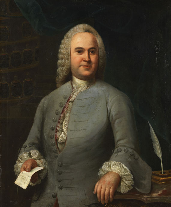 Nicolaus Georg Geve: Porträt eines Apothekers, 1751 Oil on canvas, Kettere Kunst Auktion 391, 2012, Los Nr. 1241